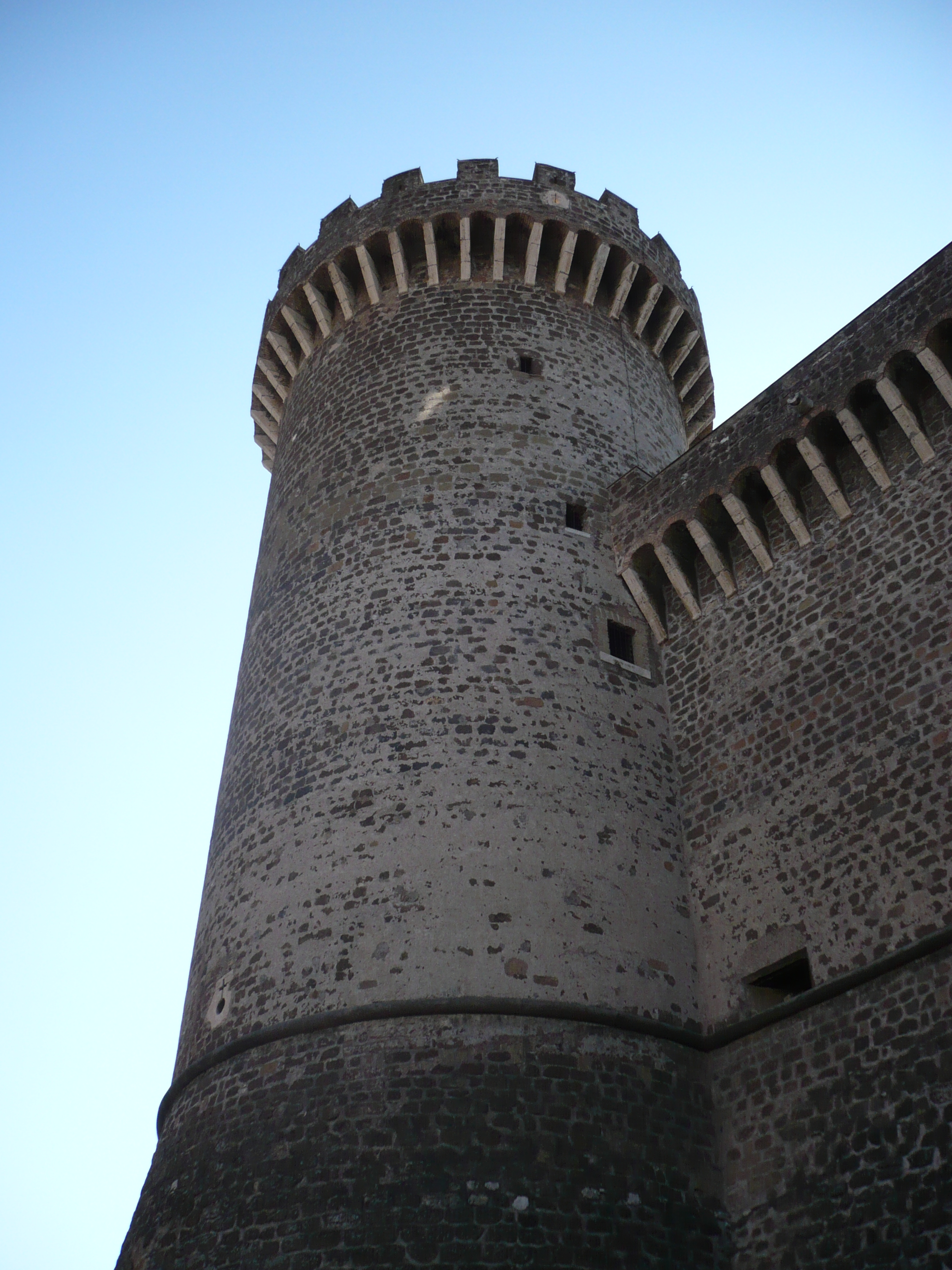 Medieval Rocca Pia, Tivoli